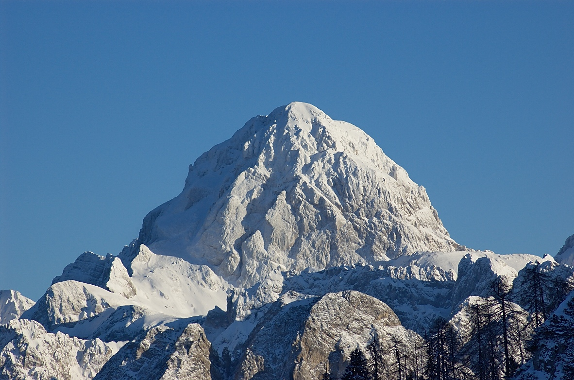 Mangart